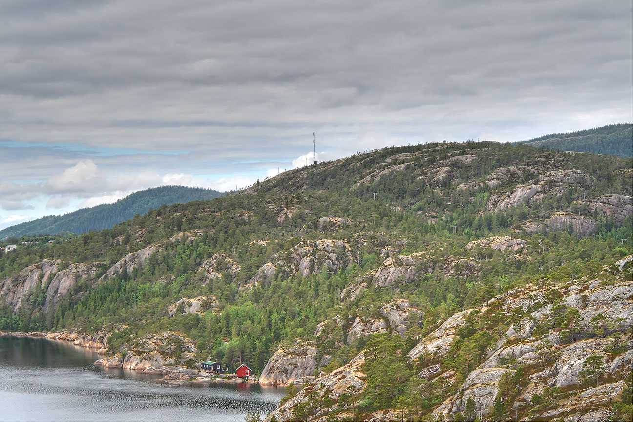 Torfjellet near Salsbruket, Nærøy kommue, Norway